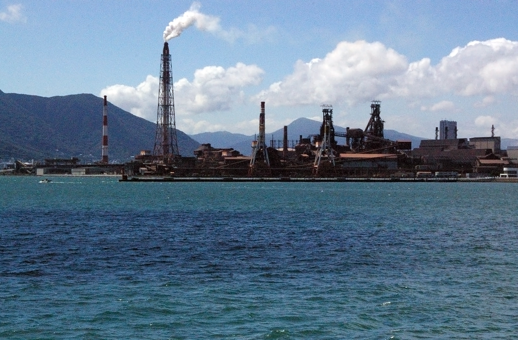 住友金属小倉製鐵所。関門航路上の船舶から南の方角を見る。手前の防潮堤は日明海峡釣り公園のもの。赤白の煙突の向こうが小倉駅方向。